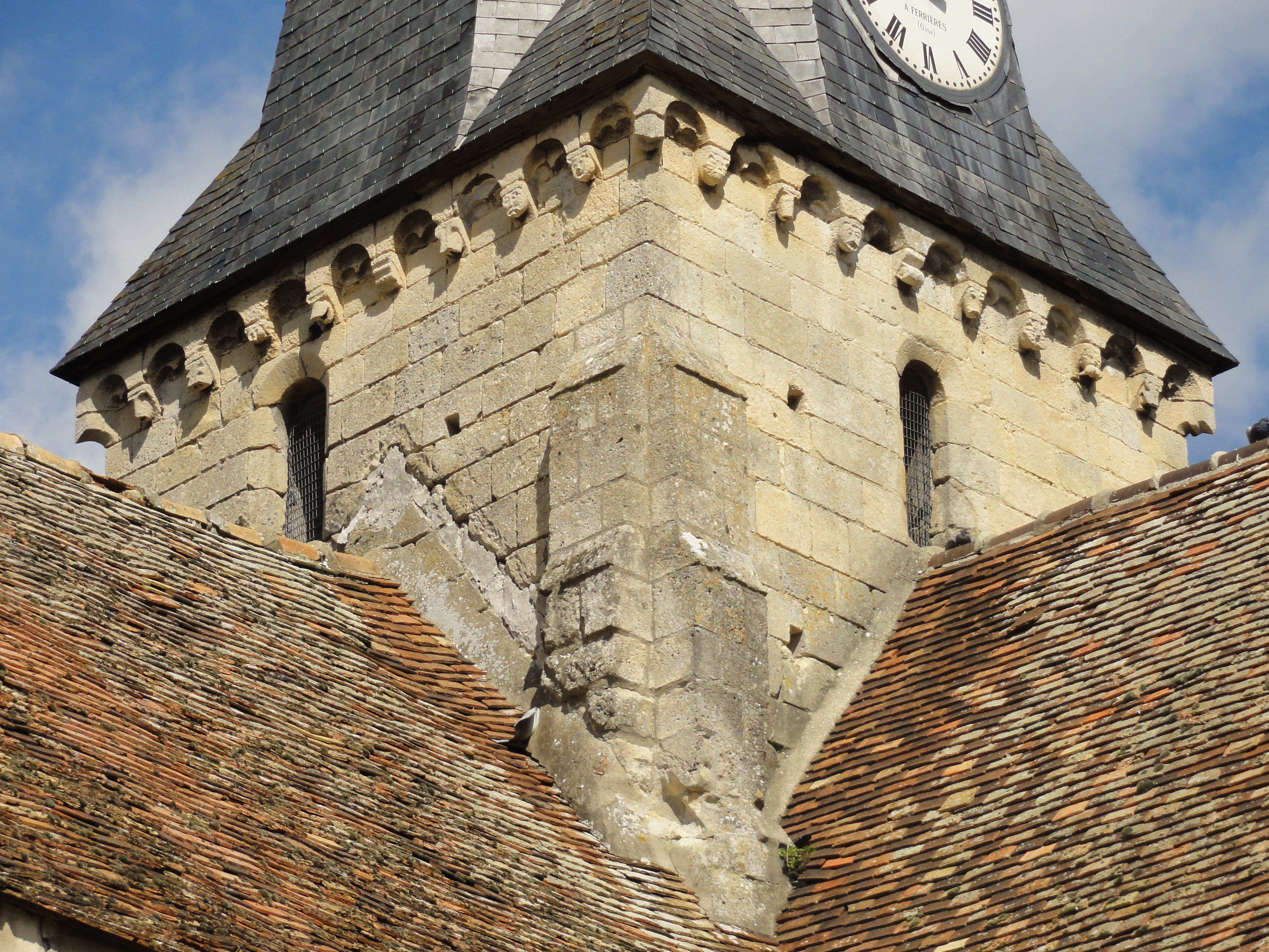 Église Saint-Pierre-aux-Liens-et-Saint-Étienne de Brignancourt - voir titre.